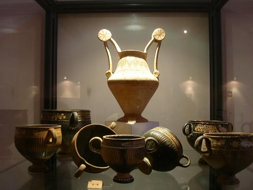 Ceramica Messapica, Centro documentazione messapica Oria, Palazzo Martini. Foto personale --Galiano.M 22:55, 16 ott 2007 (CEST)Galiano M.